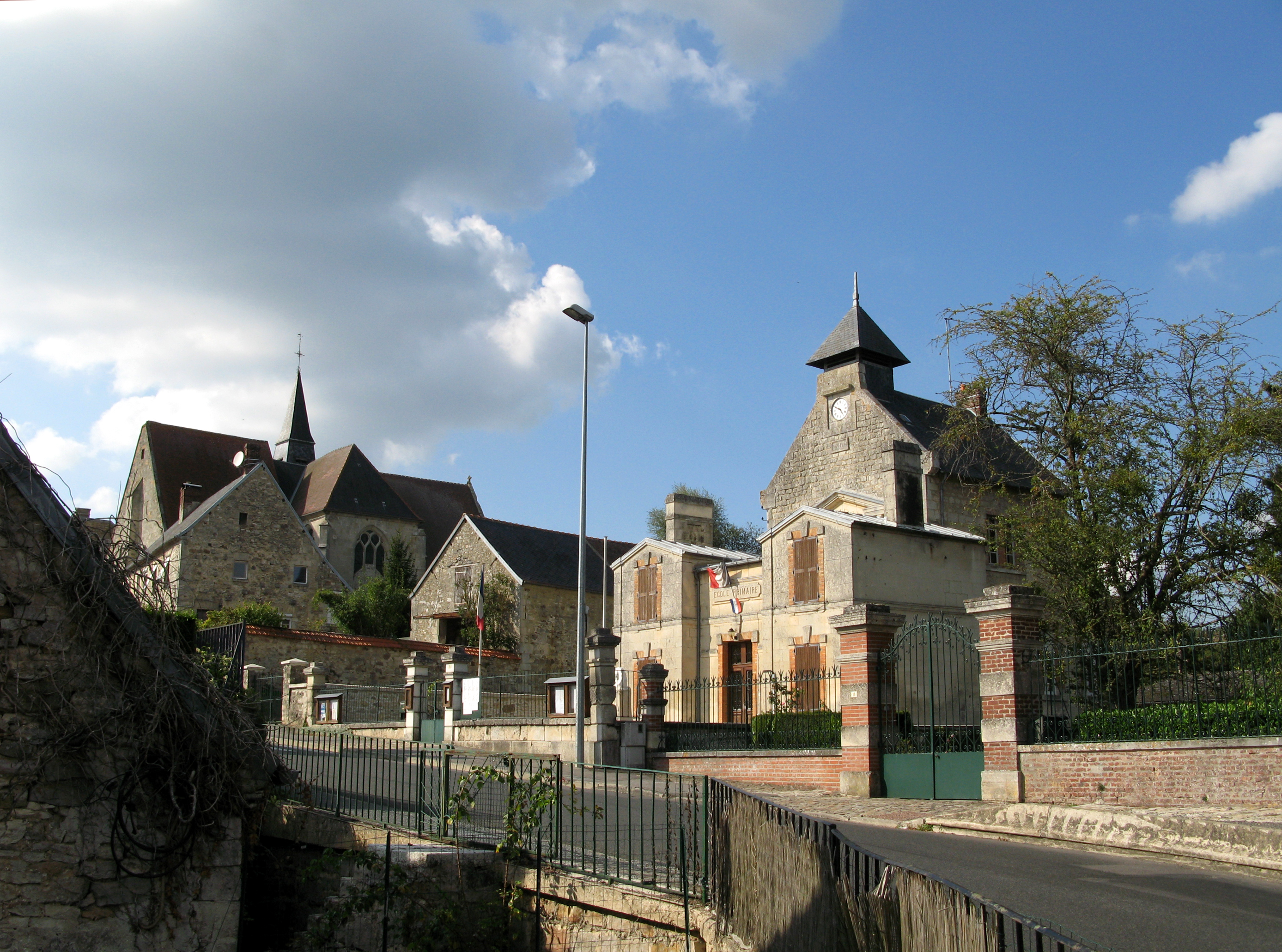 Dampleux (Aisne, France) - La mairie et, au fond à gauche, l'église. . .